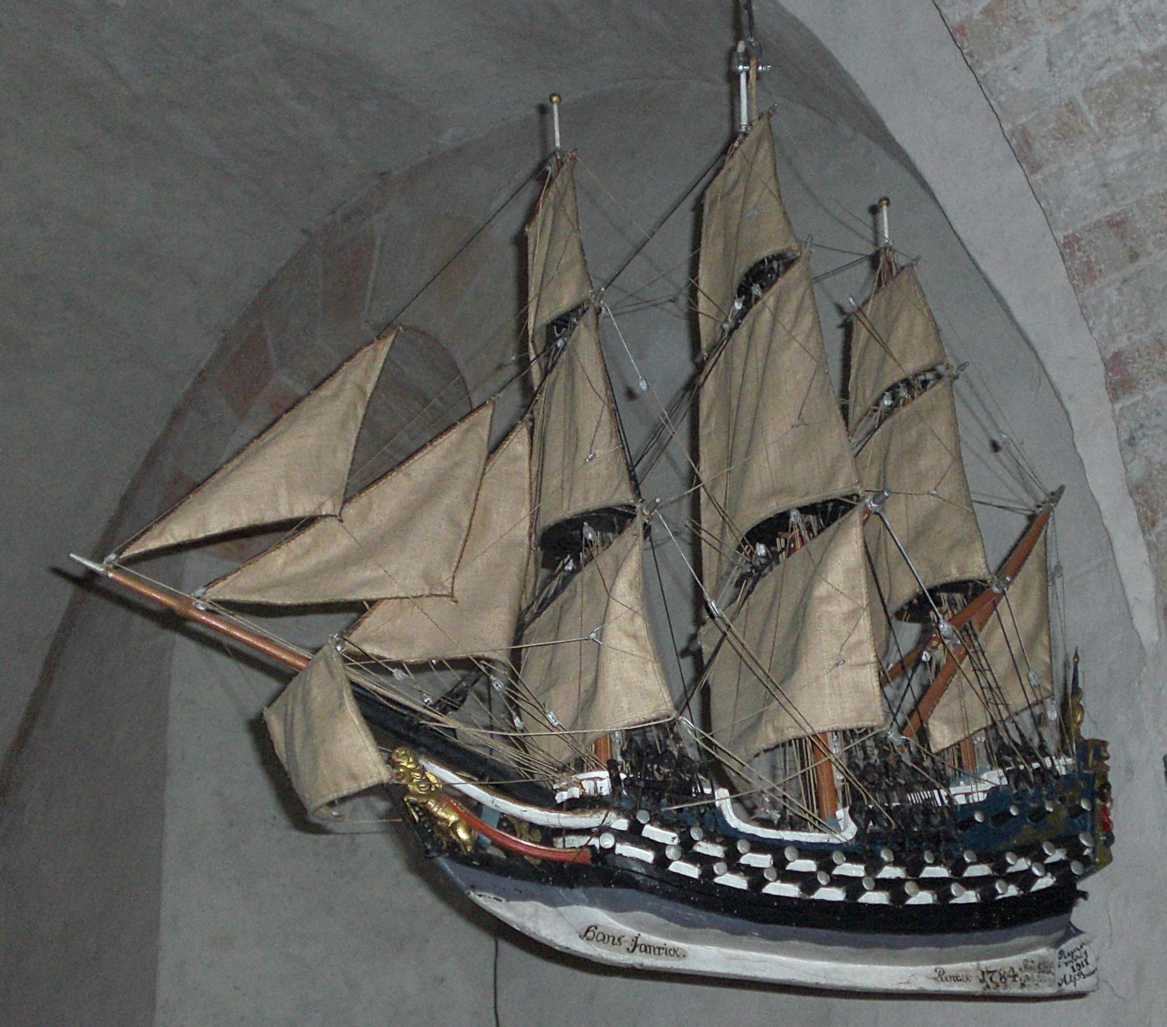 Modell des Schiffes Nyckeln in der Kirche von Gärdslösa auf Öland, Schweden